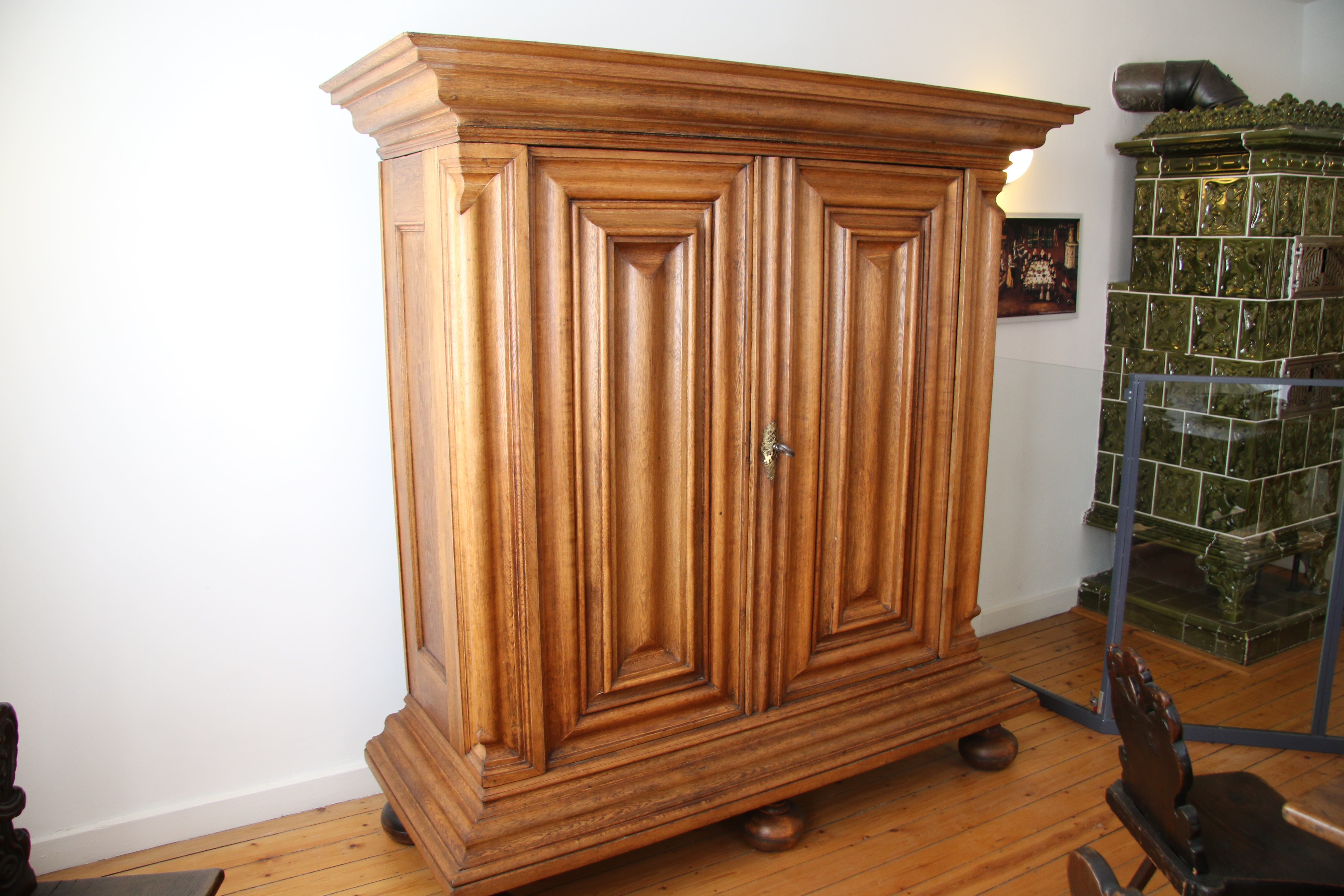 Schöner Wellenschrank im Bachgaumuseum im Nothigsgut in Großostheim